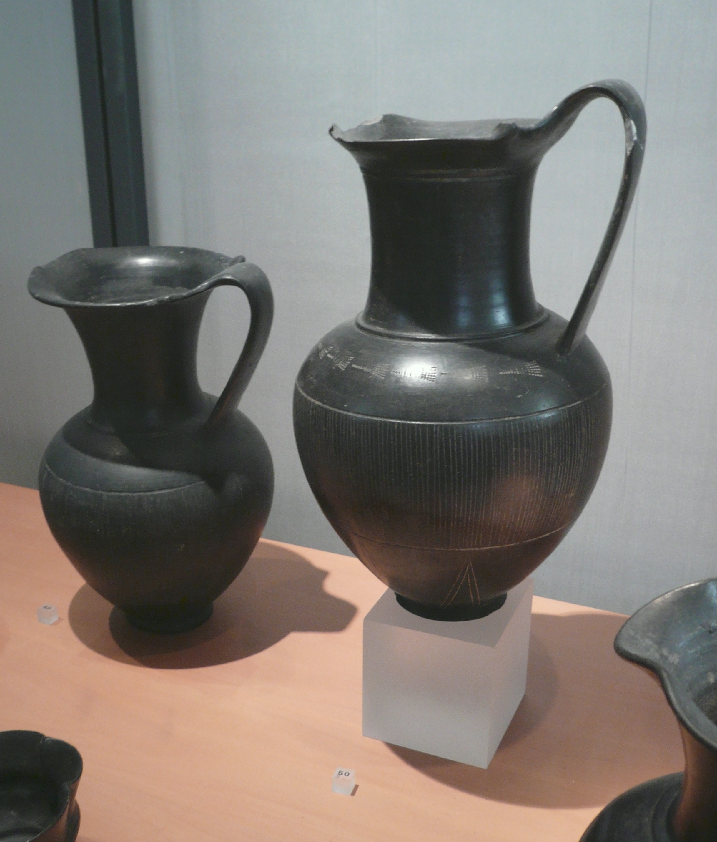 Etrurie, Œnochoés 625-600 avant J.C., musée d'archéologie méditerranéenne de la vieille Charité à Marseille.